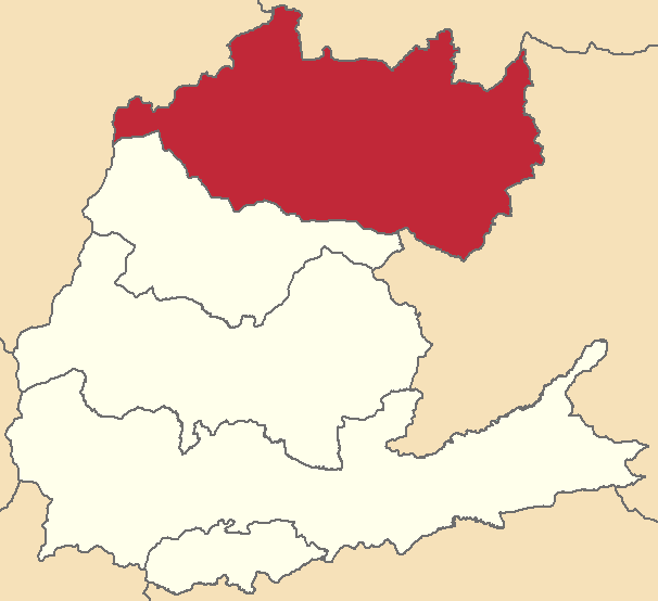 Mapa localizacor del cantón en Napo, Ecuador